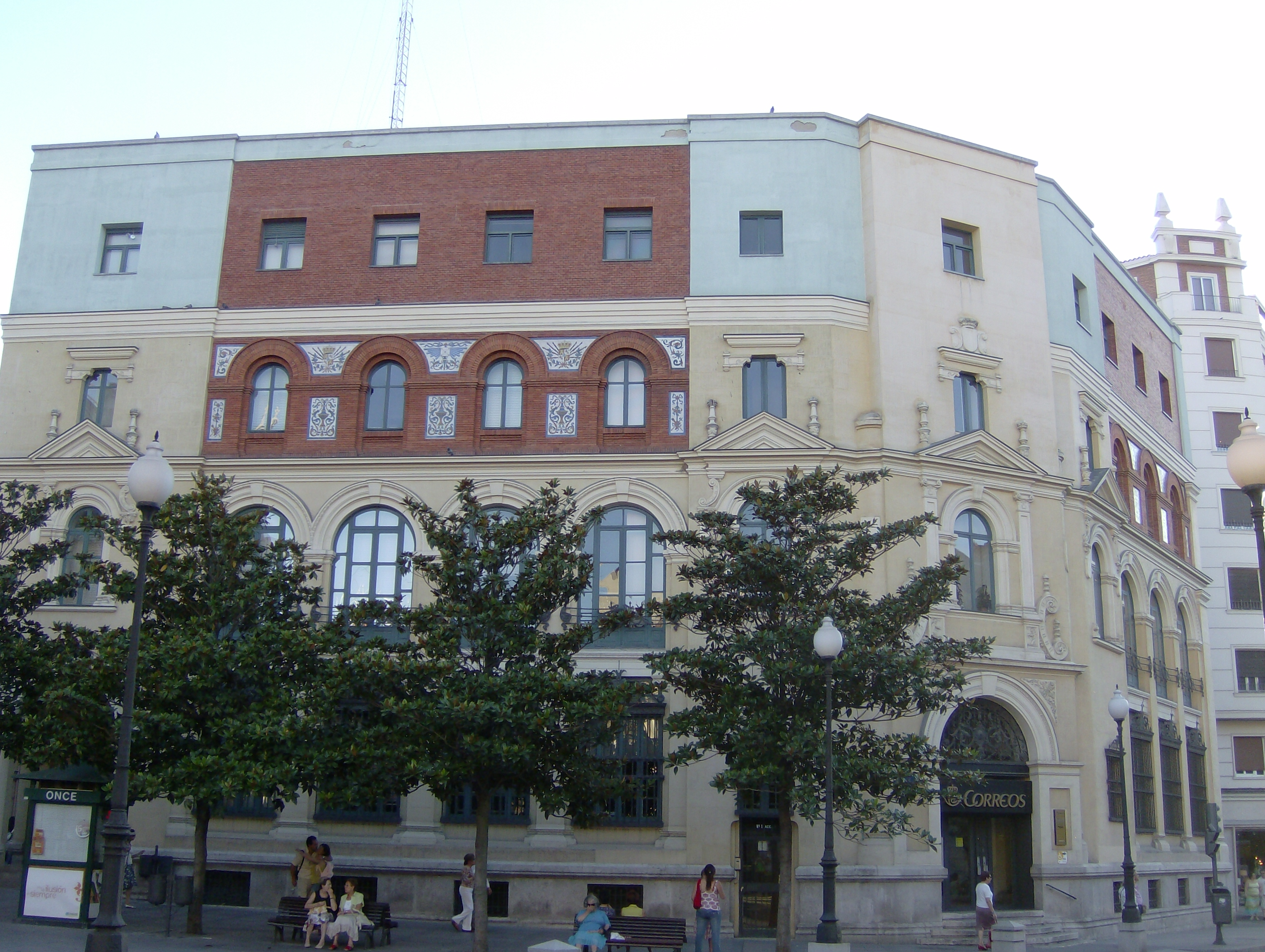 Palacio de Correos y Telégrafos de Valladolid